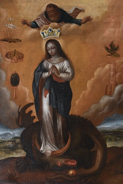 Obraz Matki Bożej Łukawieckiej-Matki Bożej Tartakowskiej umieszczony w Kościele-Sanktuarium Matki Bożej Łaskawej w Łukawcu (Polska)